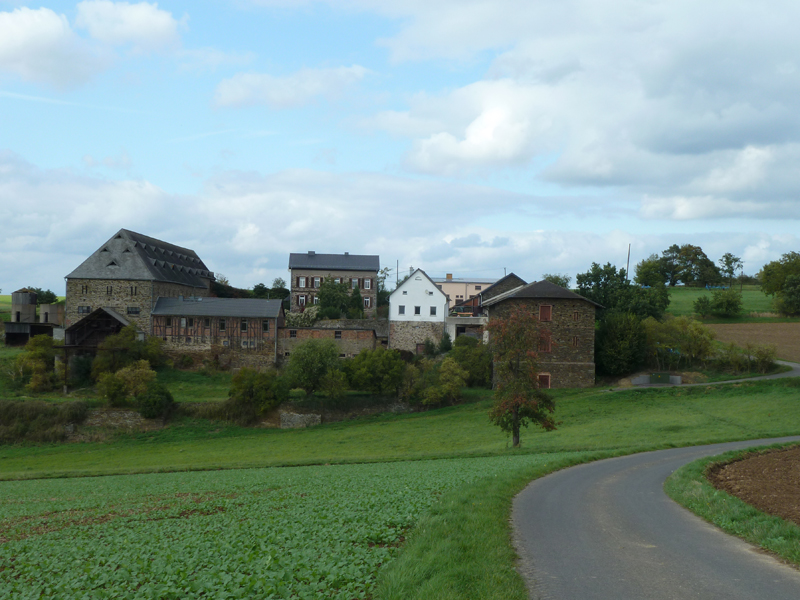 Hof Offenthal (Blickrichtung von Süden) südlich des Ortes auf der Höhe um 1860/70 ehemalige Staatsdomäne; Vierseithof, Bruchstein; Gesamtanlage mit Wohnhaus, um 1860/70, zwei Scheunen, um 1900 und um 1930, mehrere Wirtschaftsgebäuden vermutlich um 1250 Siedlungsort noch vor Gründung der Gemeinde Reichenberg